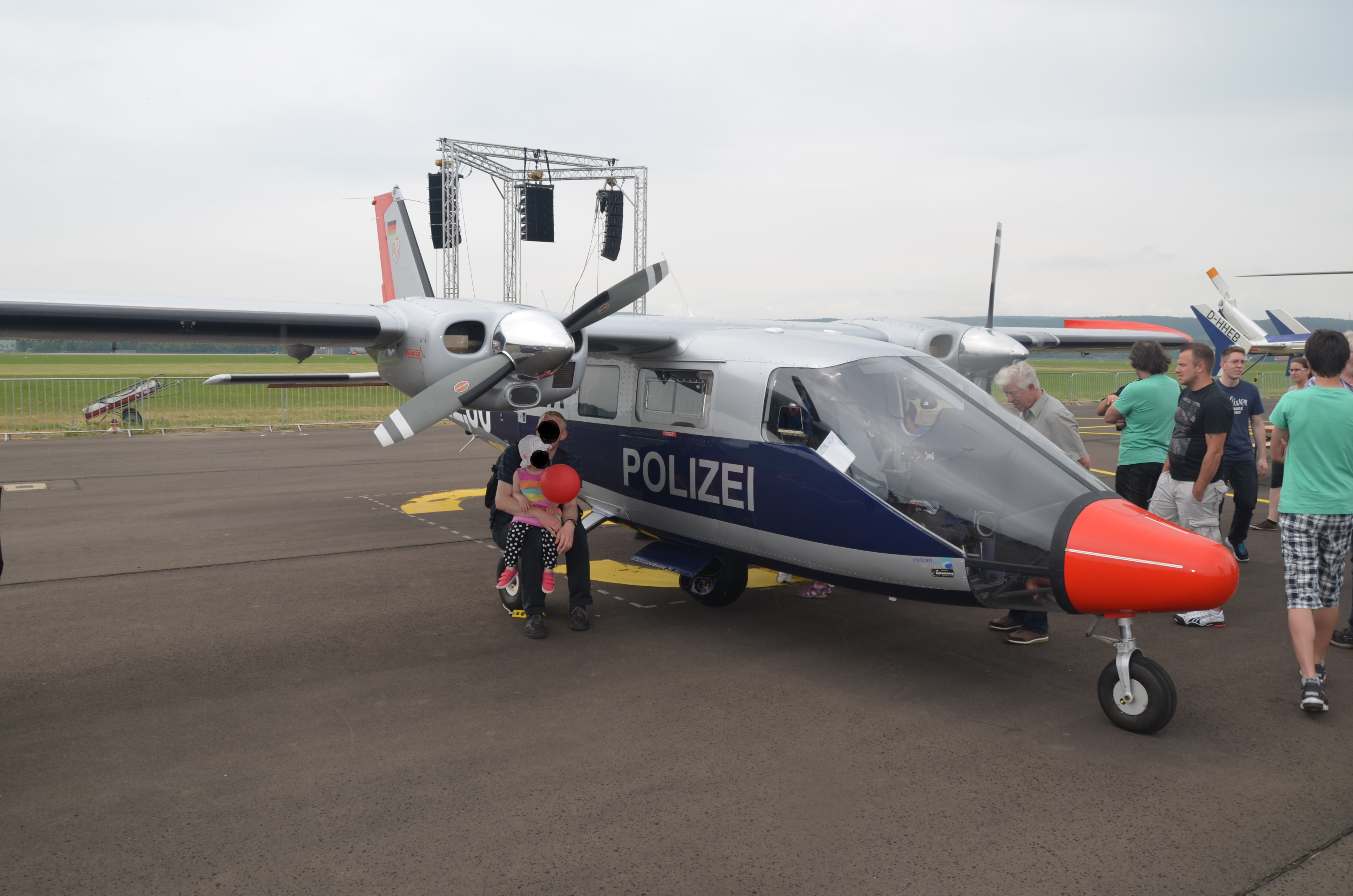 PolizeiflugzeugHessen